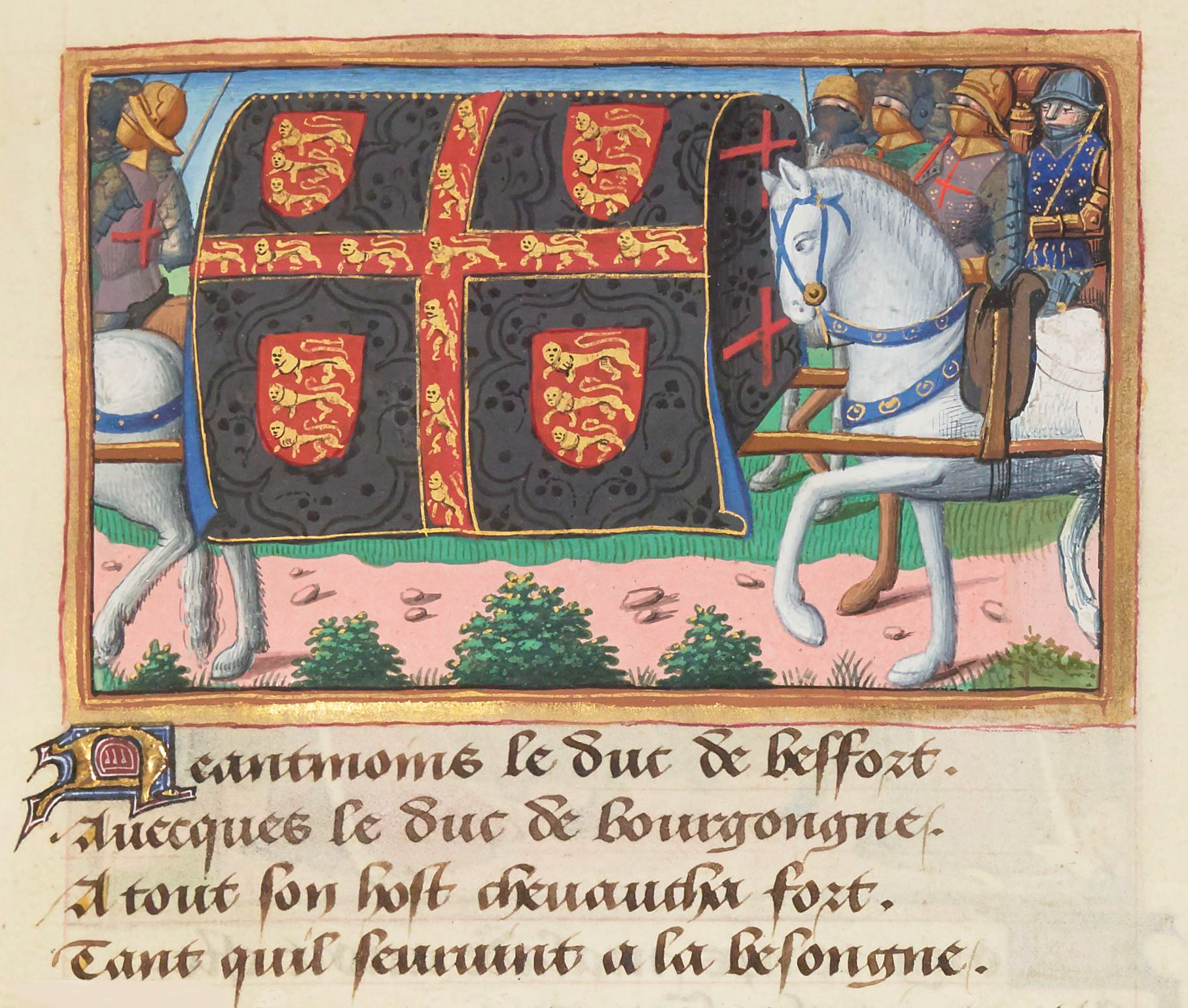 Funérailles du roi Henri V d'Angleterre.